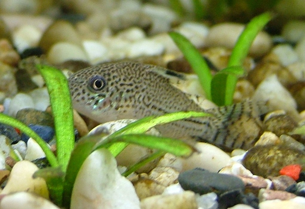 Juliipanzerwels (Corydoras Julii) im Aquarium